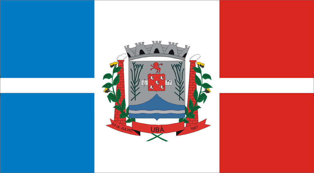 Bandeira da Cidade de Ubá, Minas Gerais, Brasil